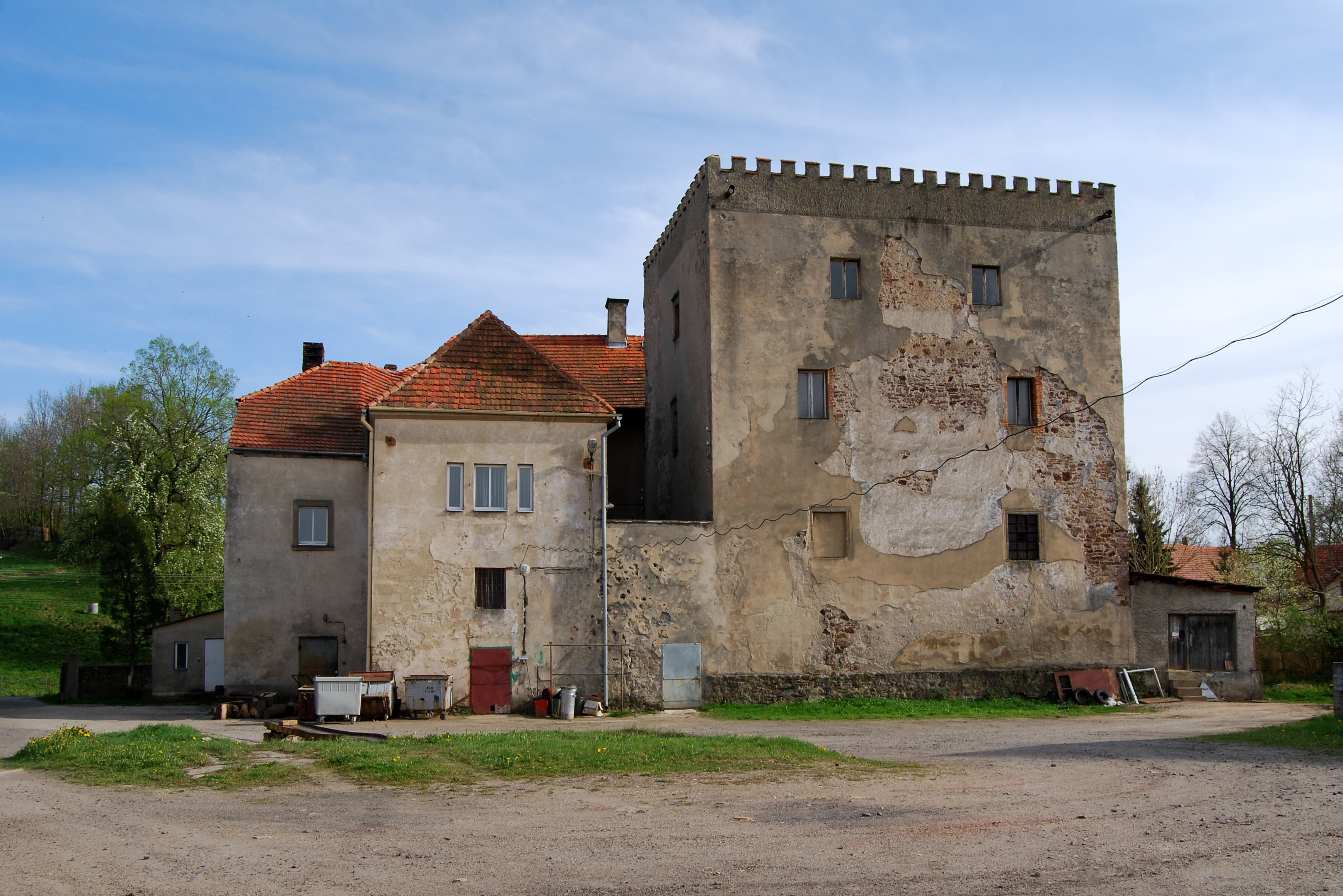 Sędziszowa, ul. Polna 6 - dwór z wieżą mieszkalną; obecnie budynek administracyjno – biurowy Zarządu Lokali Gminnych, XV-XVIII w., 2 poł. XIX w. (zabytek nr 577 z 18.03.1959)